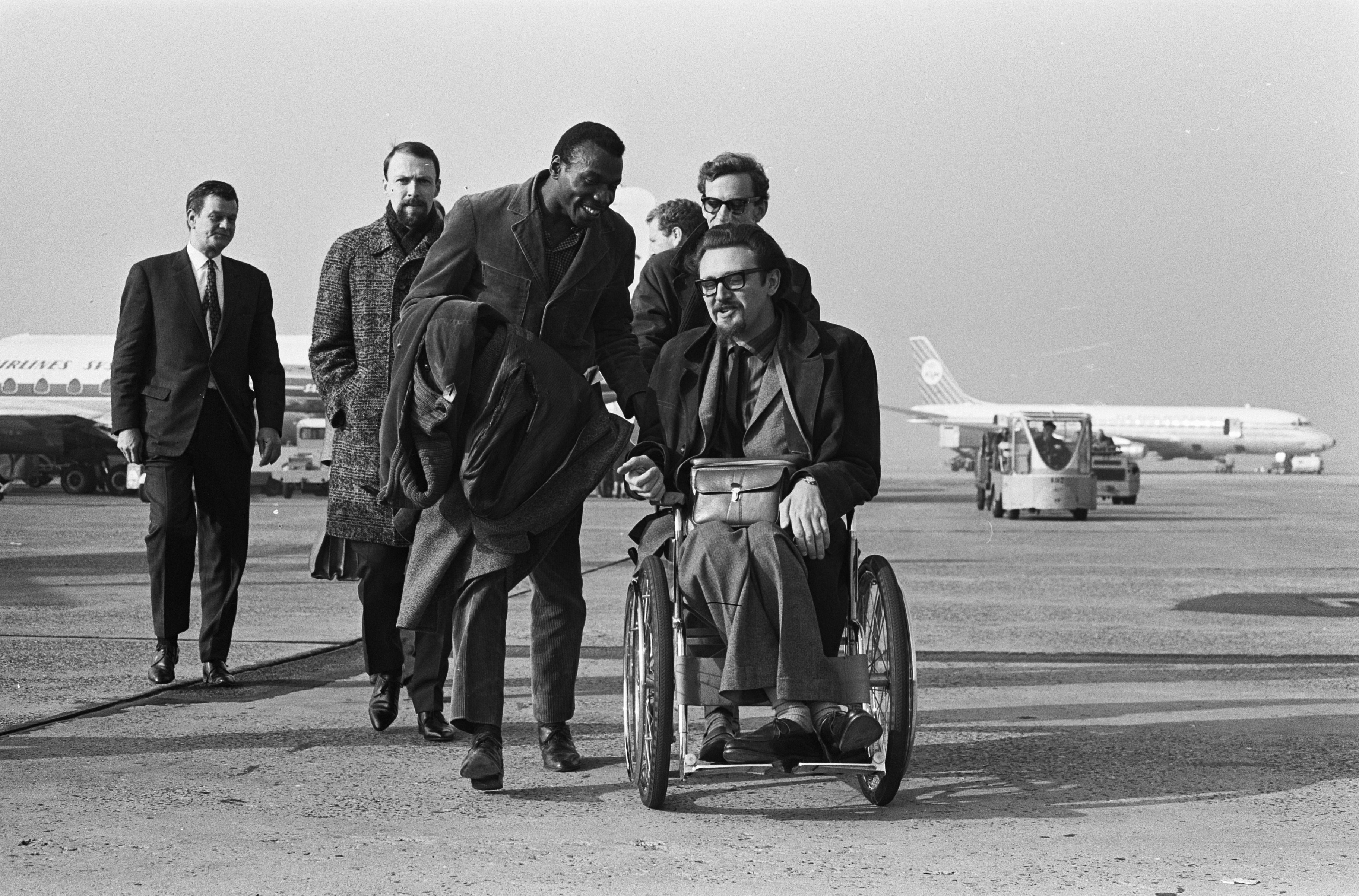 Collectie / Archief : Fotocollectie Anefo Reportage / Serie : [ onbekend ] Beschrijving : Amerikaanse jazz-saxofonist John Coltrane op Schiphol aangekomen. Rechts Michiel de Ruyter. Links Elvin Jones, de drummer van Coltrane. Datum : 26 oktober 1963 Trefwoorden : aankomsten, saxofonisten Persoonsnaam : Elvin Jones, John Coltrane, Ruyter, Michiel Adriaansz. de Fotograaf : Gelderen, Hugo van / Anefo Auteursrechthebbende : Nationaal Archief Materiaalsoort : Negatief (zwart/wit) Nummer archiefinventaris : bekijk toegang 2.24.01.05 Bestanddeelnummer : 915-6747